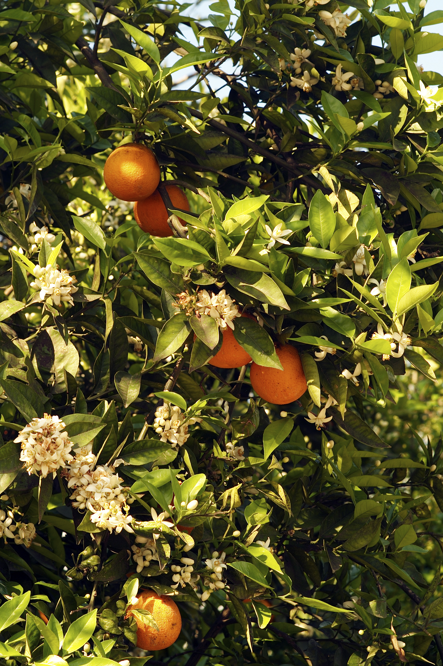 INRA, Jean Weber